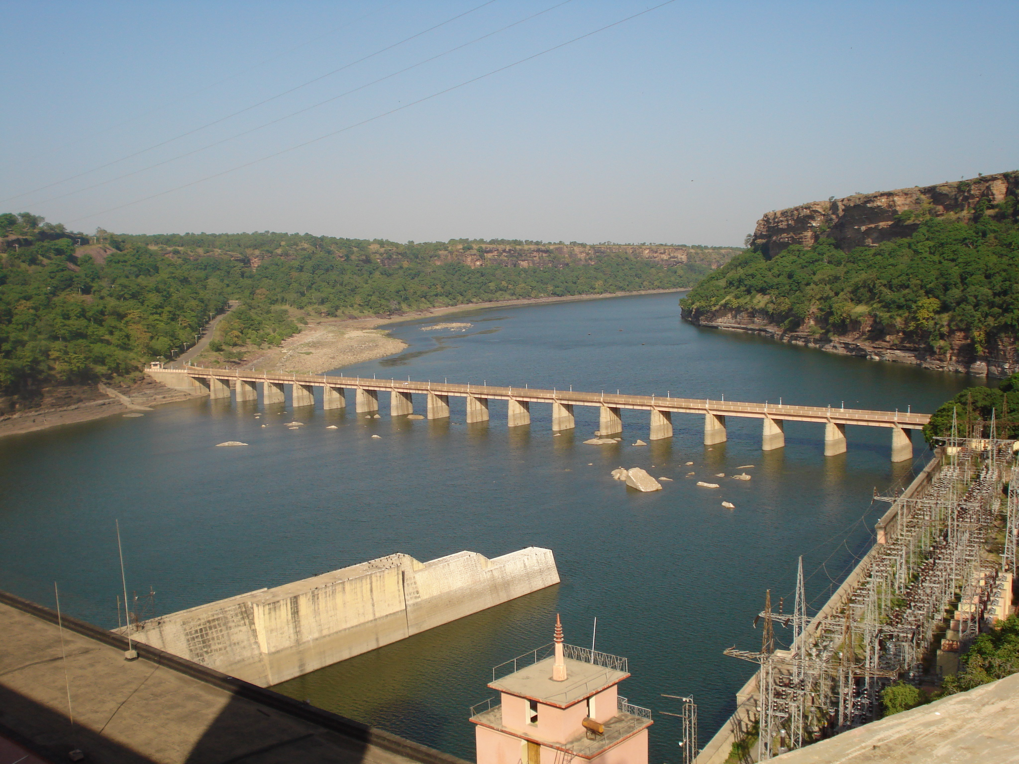 Gandhi_Sagar_Mandsaur, Madhya Pradesh, India